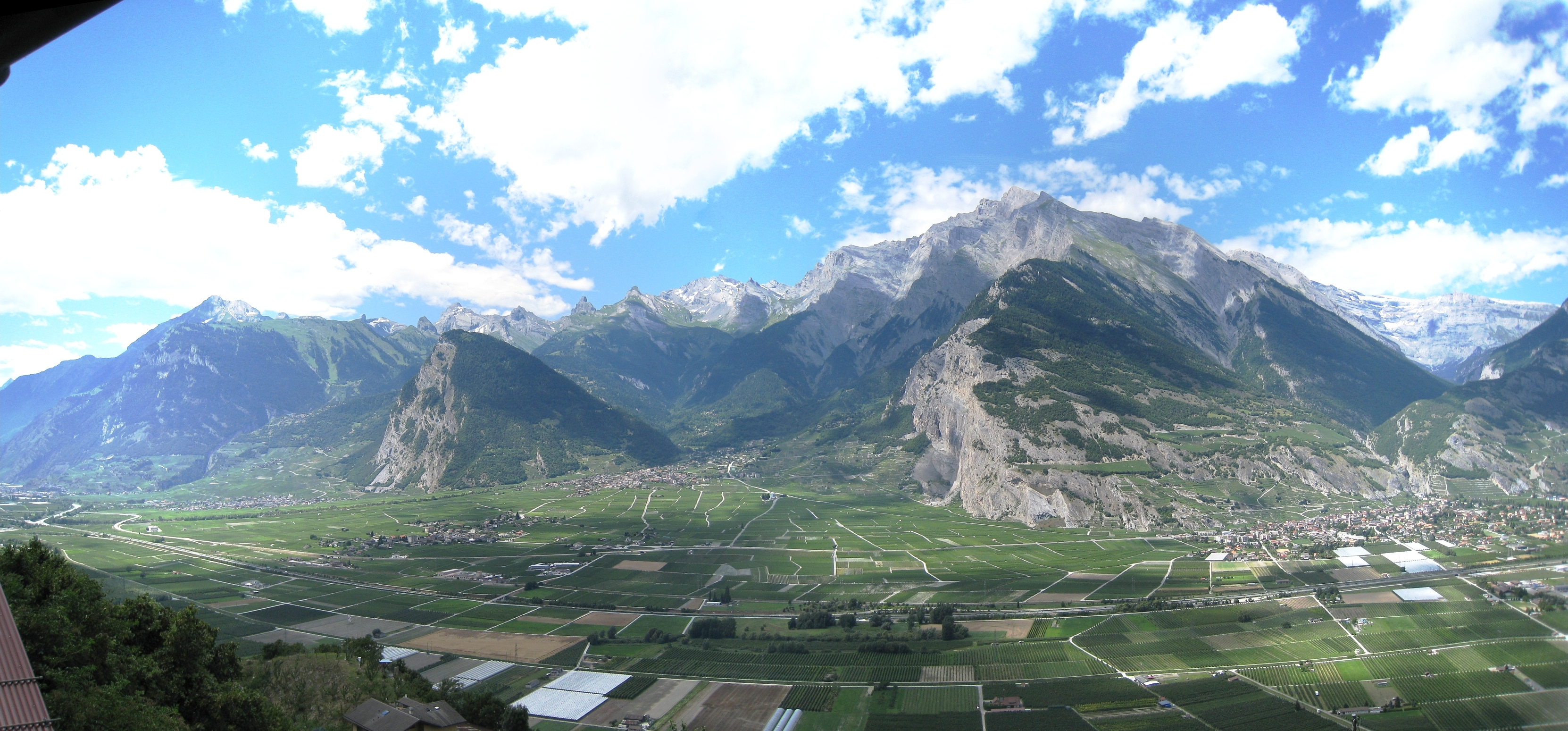 Vue sur la plaine du Rhône depuis le village de Fey(Nendaz)